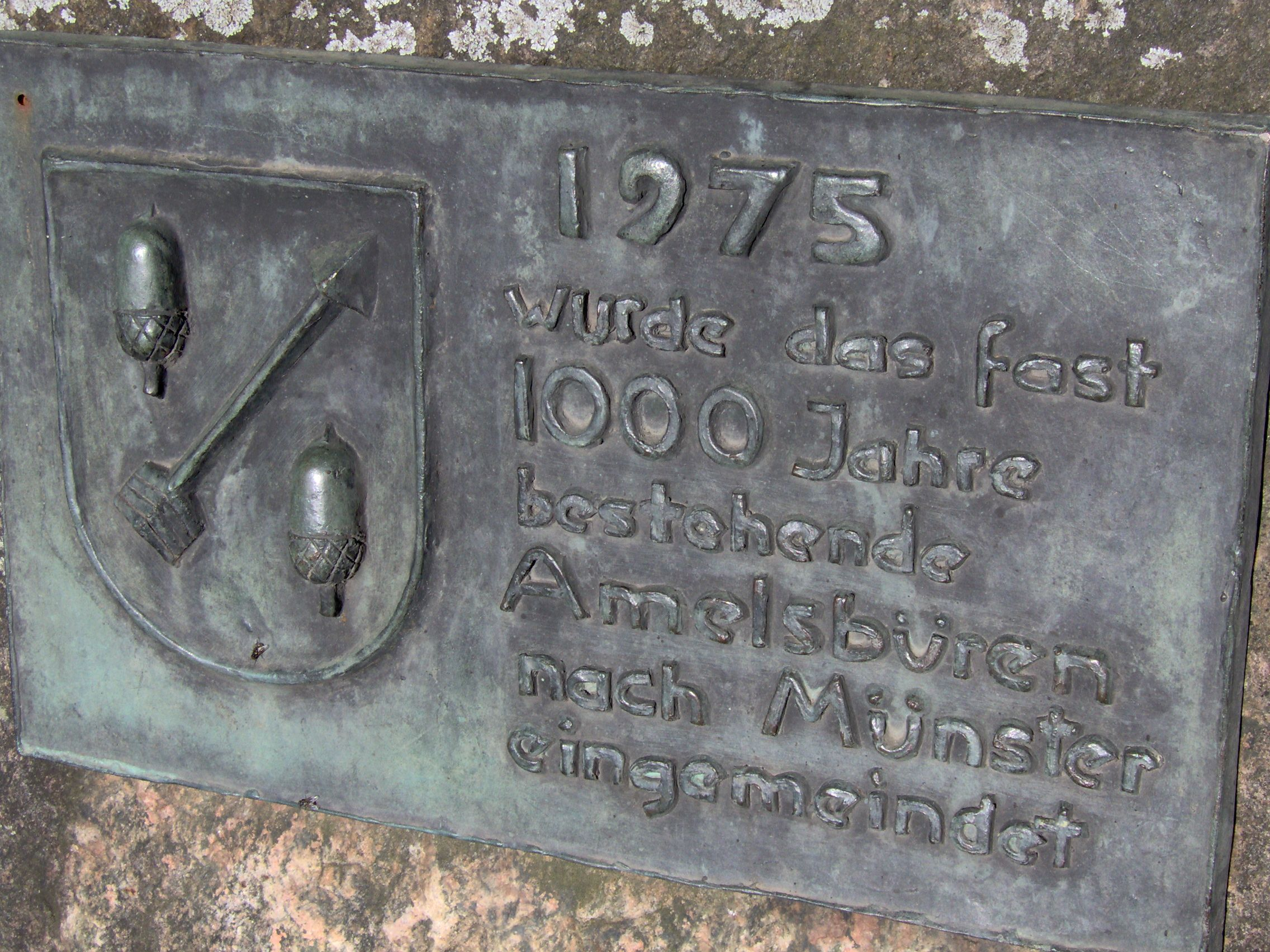 Erinnerungstafel an die Eingemeindung Amelsbüren